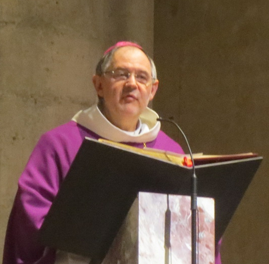 L’archevêque de Besançon Jean-Luc Bouilleret, célébration du mercredi des Cendres 2014 à cathédrale Saint Jean de Besançon Da This file has been extracted from another file: Jean-Luc Bouilleret 001.JPG